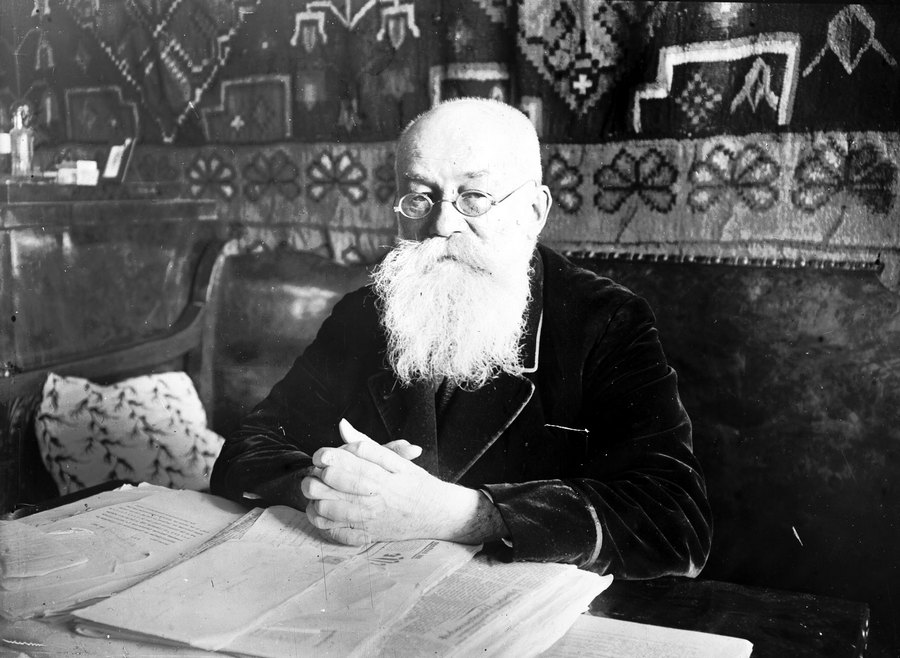 М. С. Грушевський у своєму робочому кабінеті в будинку по вул. Паньківській, 9. [1928–1930 рр.]. Київ, ЦДКФФА України ім. Г. С. Пшеничного, од. обл. 2-149004.